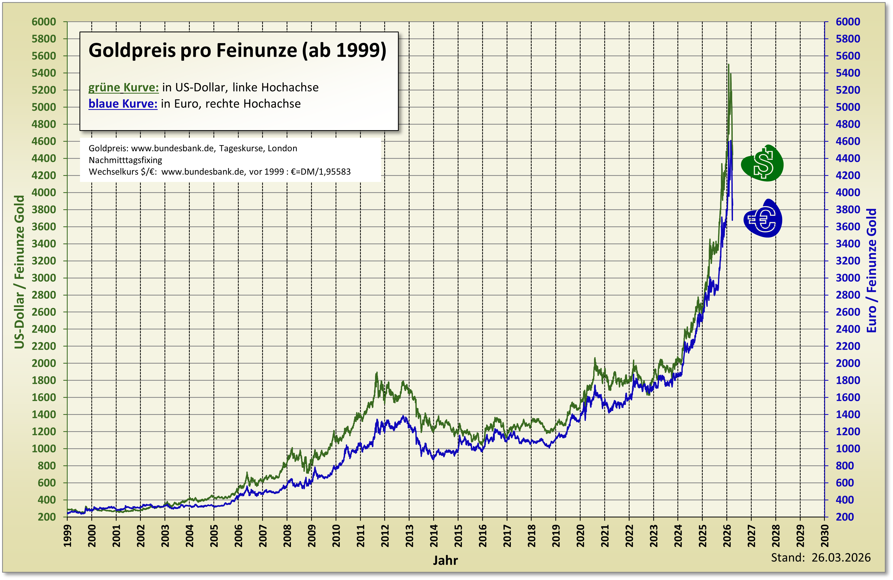 Goldpreis in Dollar (US$) und Euro (€)ab 1999